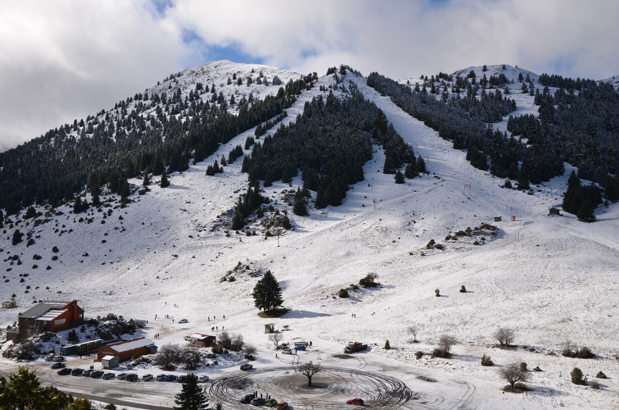 Χιονοδρομικό Κέντρο Μαινάλου This is a photography of Natura 2000 protected area with ID GR2520001